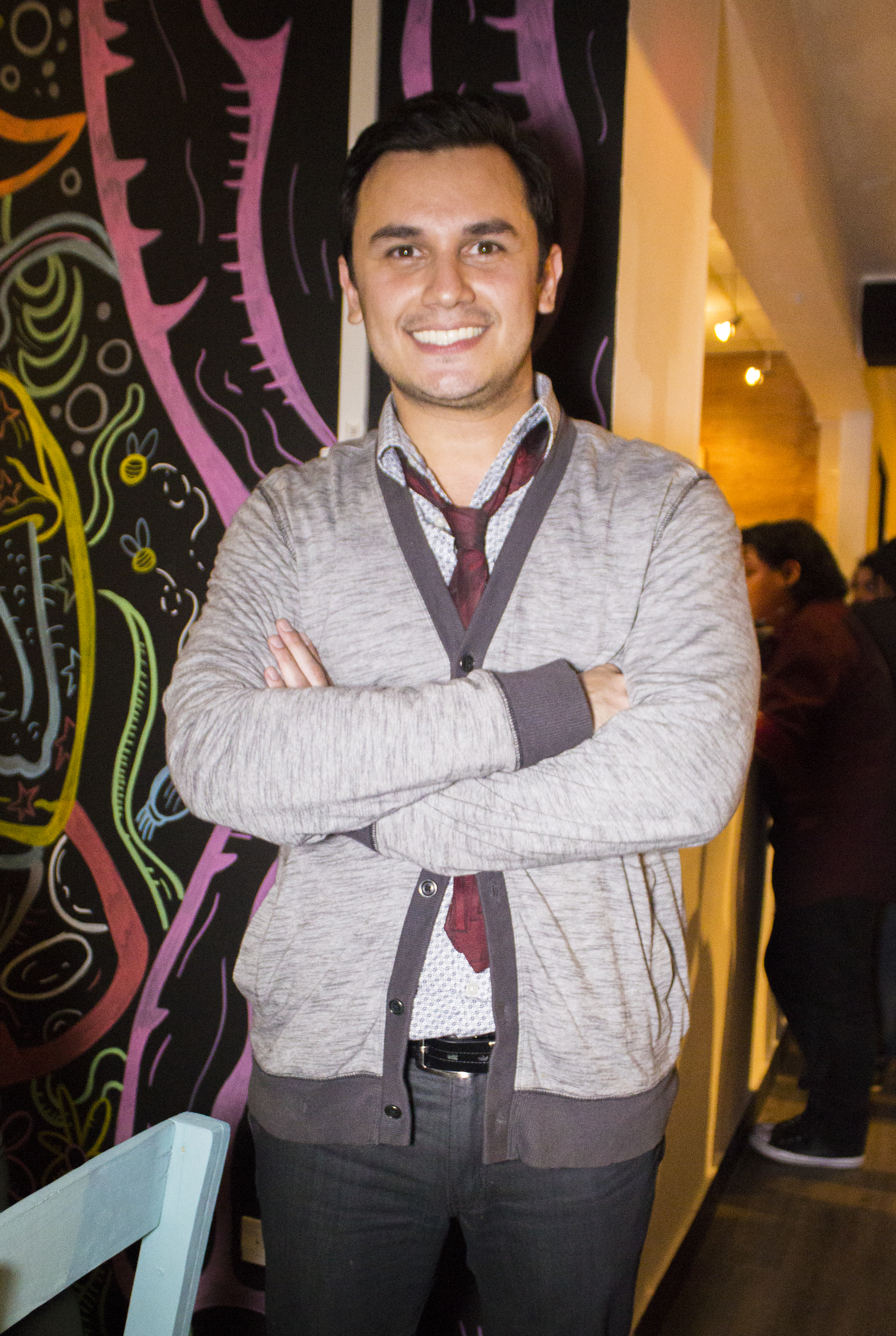 Christian Maquilón en el Teatro Café Pop-Up en Guayaquil, Ecuador, 2016.